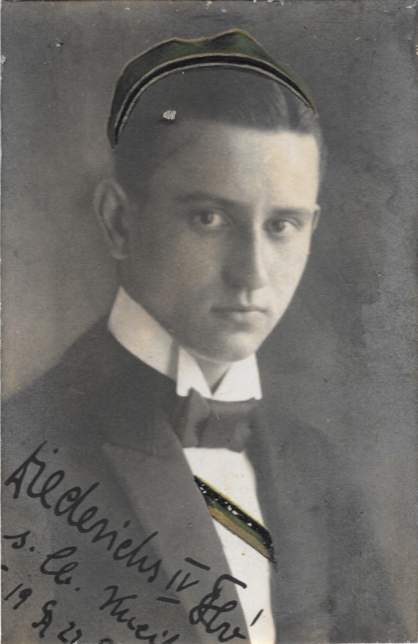 Georg Diederichs Porträt des Corps Teutonia-Hercynia